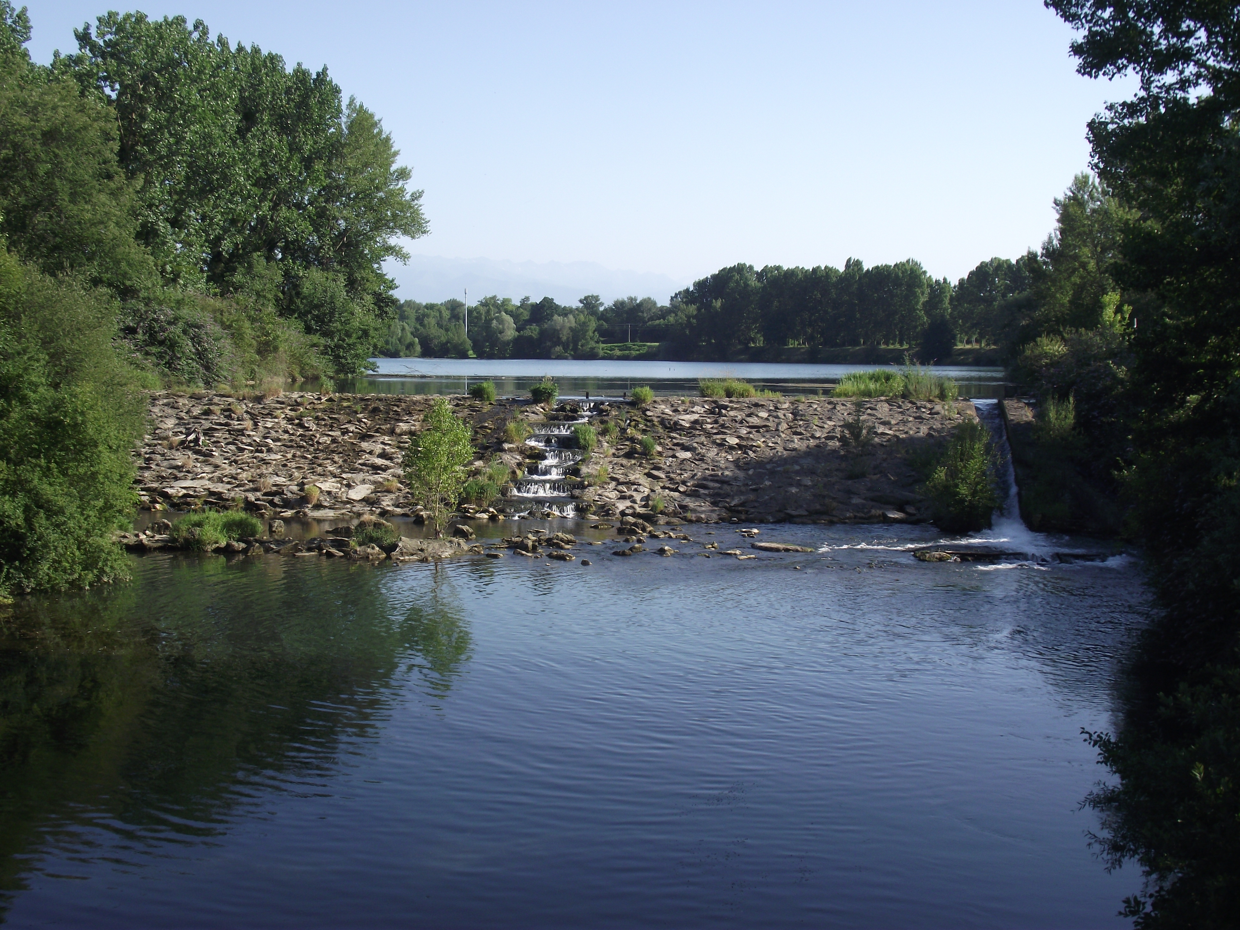 Lac de Bours (Hautes-Pyrénées France)